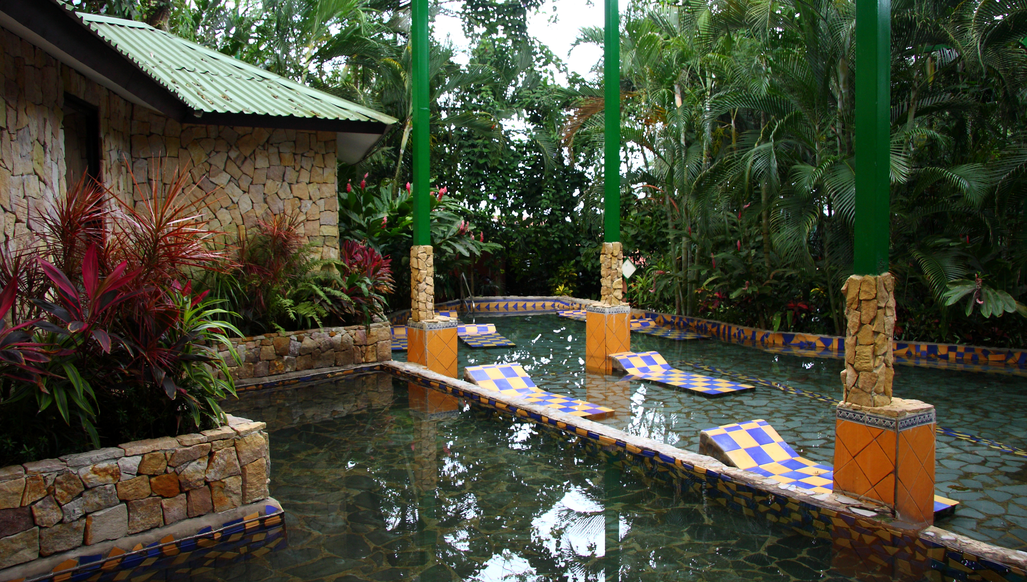 Baldi Hot Springs — La Fortuna, San Carlos, Alajuela Province, Costa Rica.